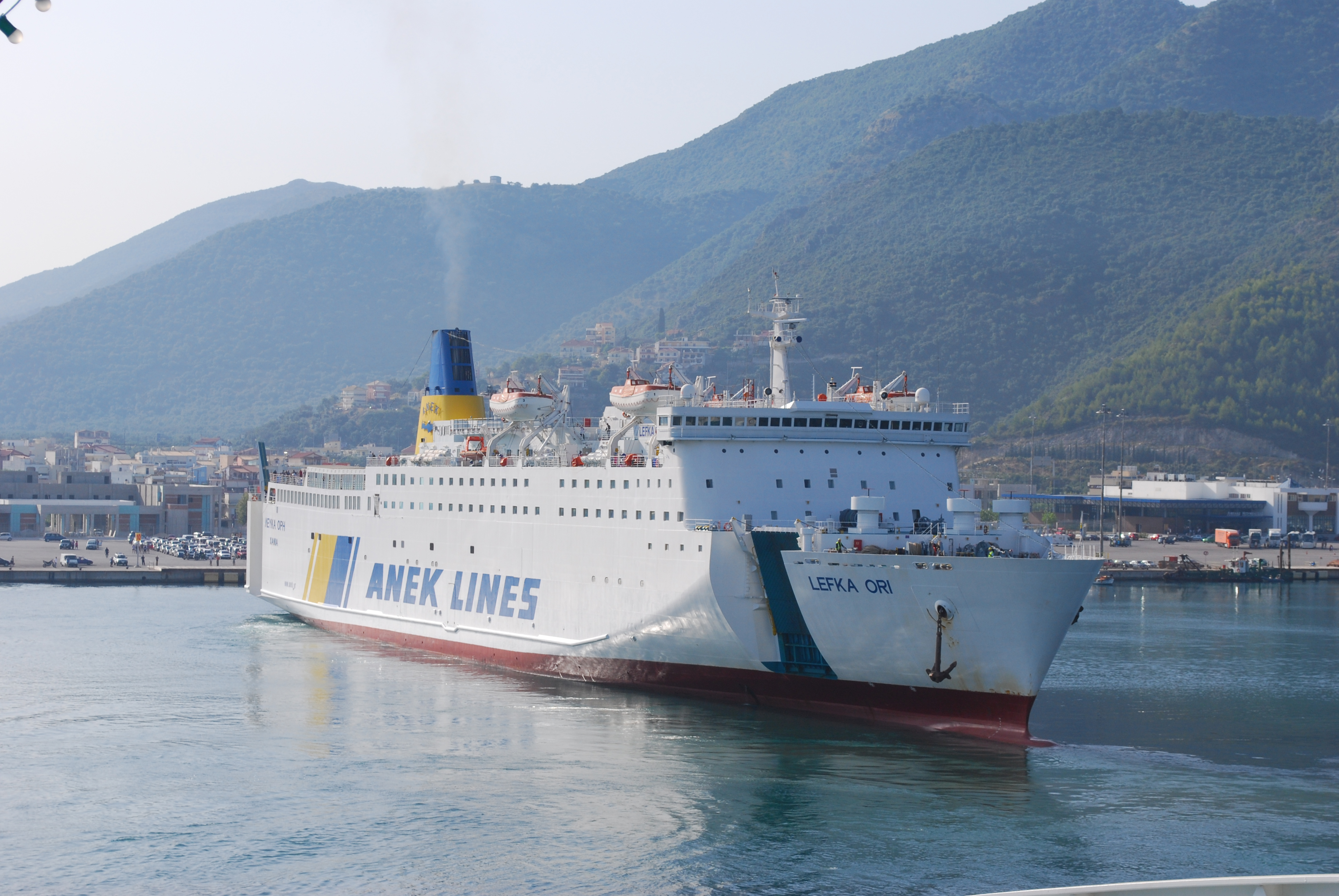 Le car-ferry "Lefka Ori" de ANEK Lines, à l'escale d'Igoumenitsa.